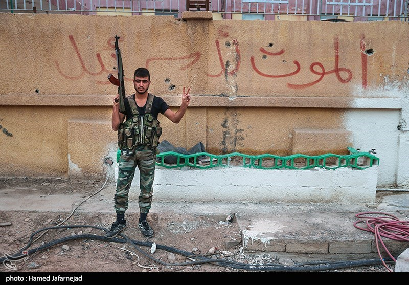 نیروهای دفاع وطنی سوریه در شهر ابوکمال استان دیرالزور سوریه